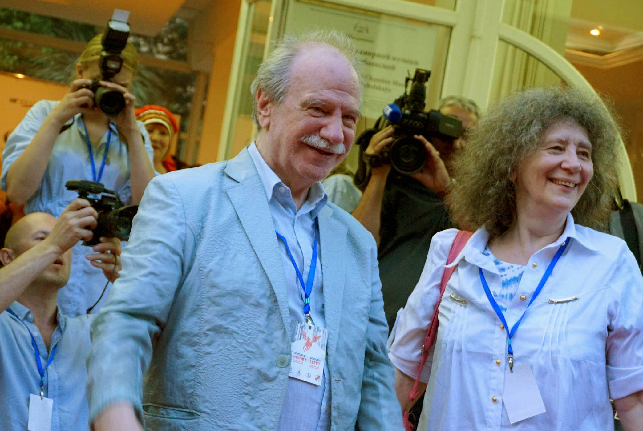 Константин Кедров и Елена Кацюба на Красной дорожке III Евразийского и III Всероссийского литературного фестиваля ЛИФФТ 2018, Сочи.